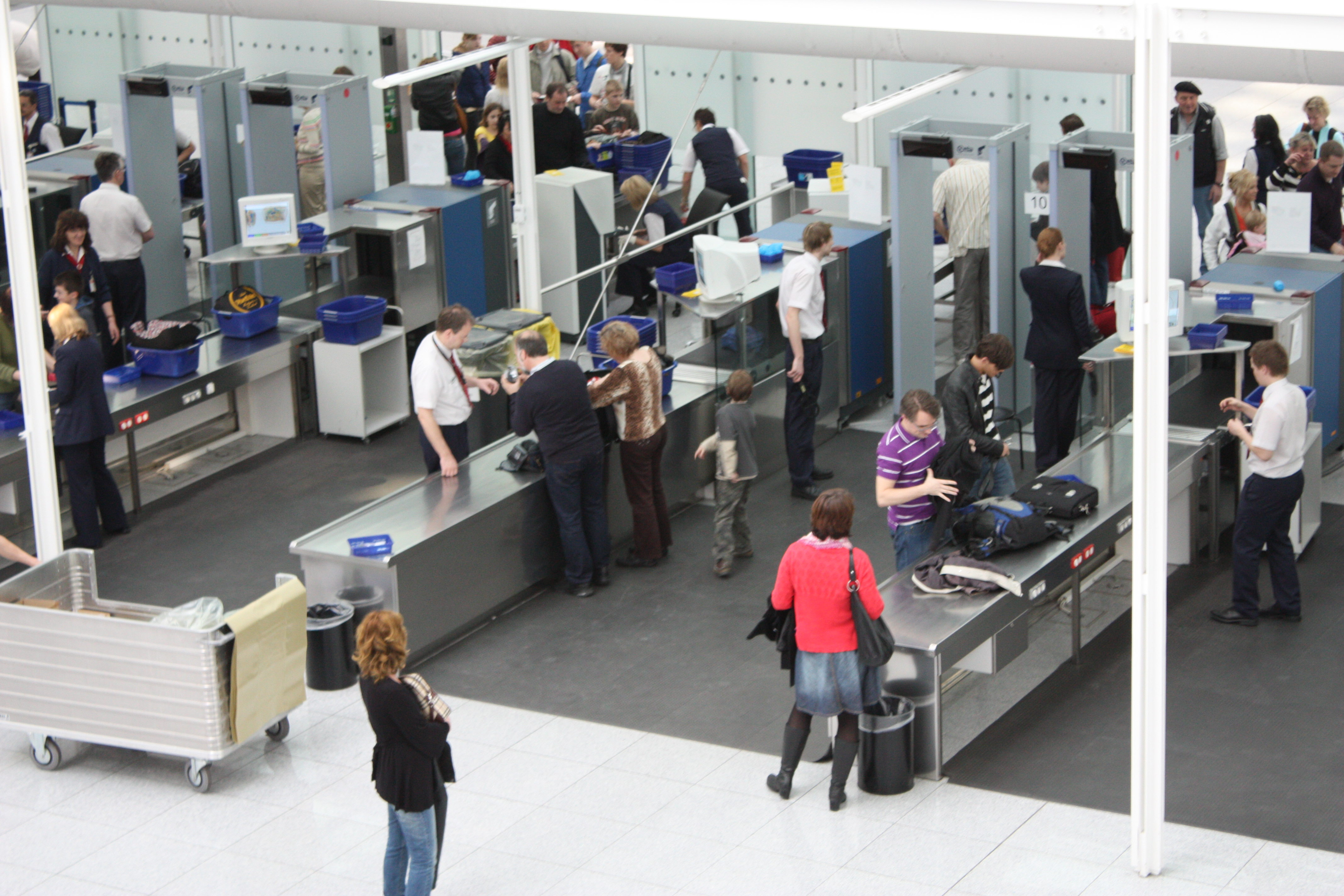 Airport Munich innen